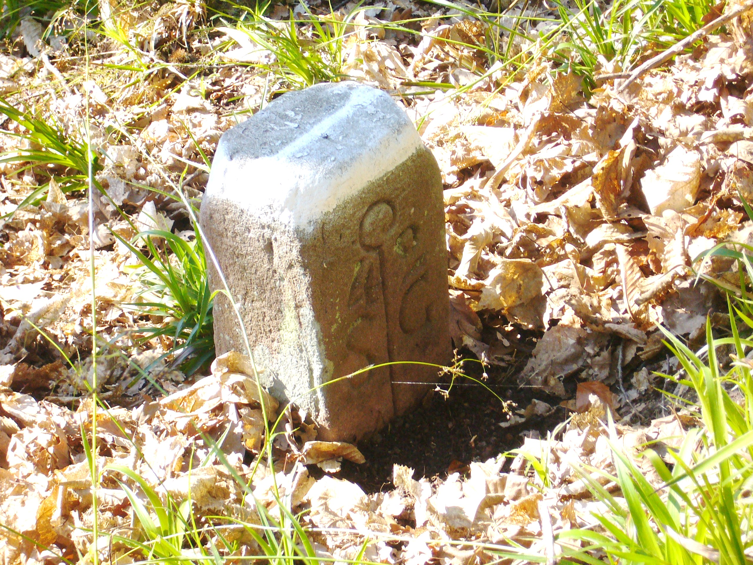 Borne cadastrale de la collégiale Saint-Georges